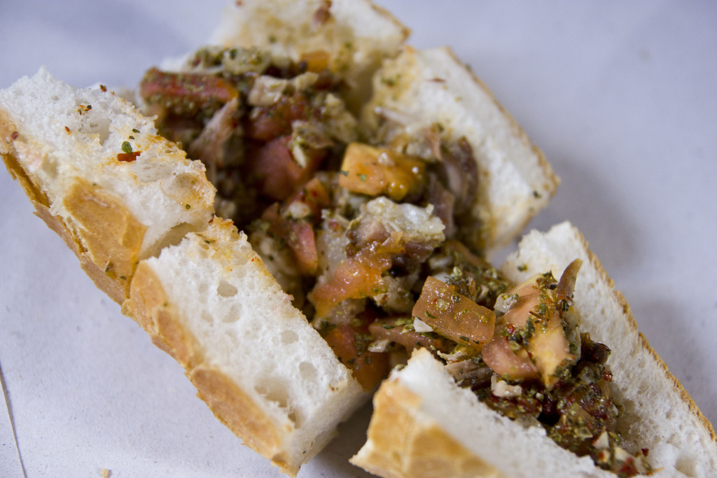 Kokoreç mit Tomaten und Gewürzen in einem türkischen Brotlaib (nach Istanbuler Art)